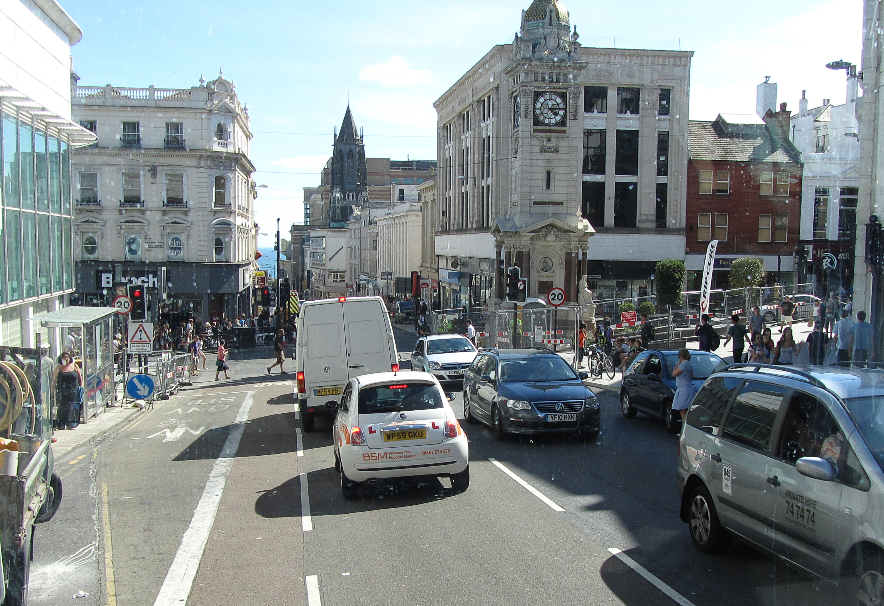 Brighton, East Sussex